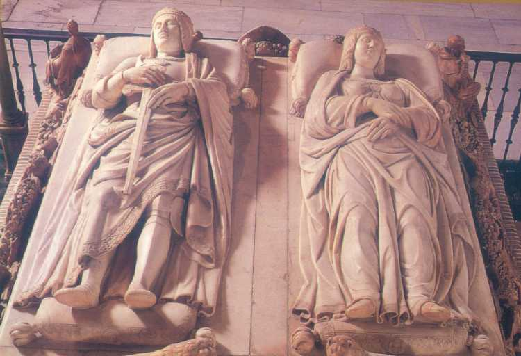 Granada-Capilla Real-7-Sepulcro de los Reyes Católicos (Domenico Fancelli)